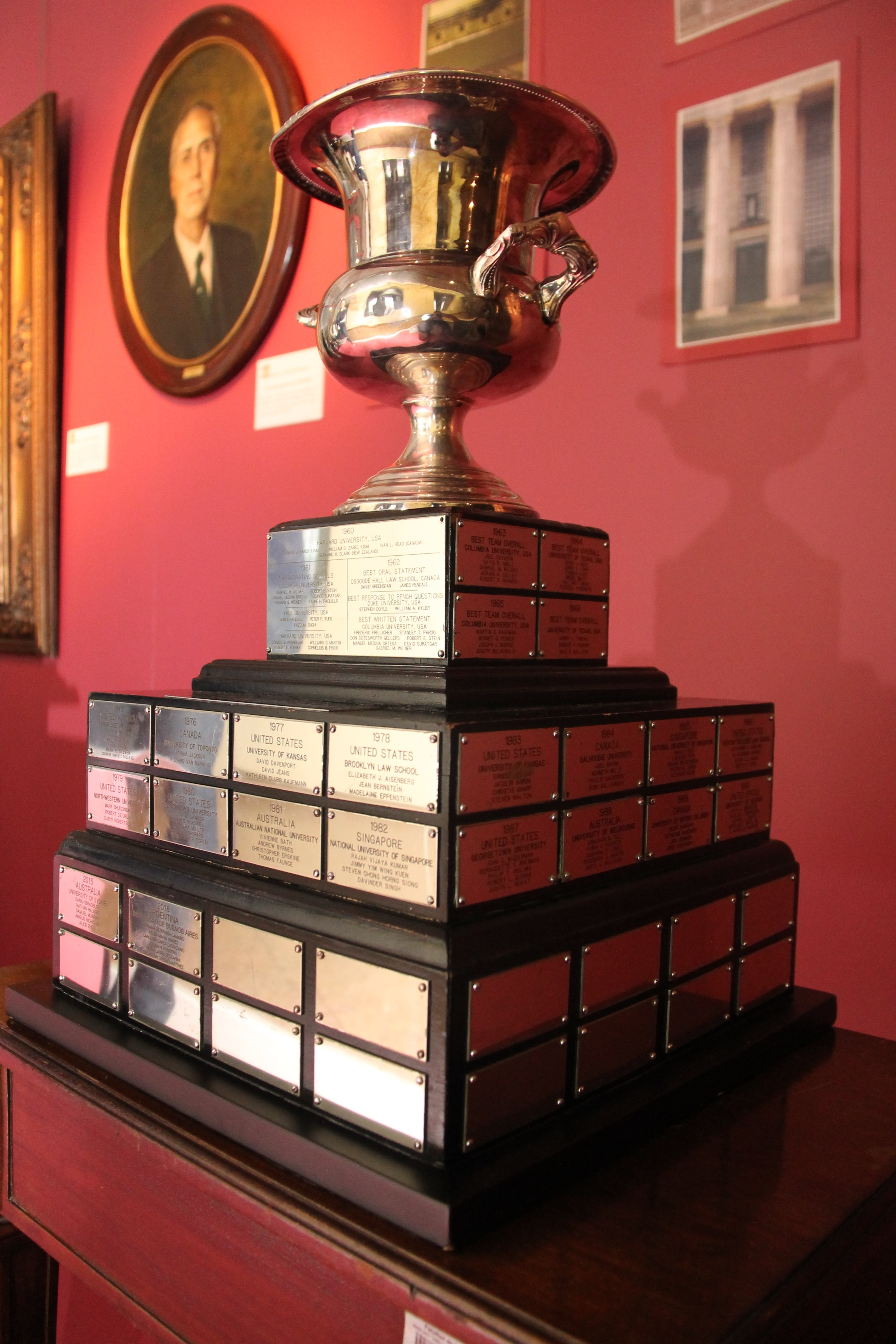 La Copa Jessup, en el Museo Histórico de la Facultad de Derecho de la Universidad de Buenos Aires, institución ganadora de Philip C. Jessup International Law Moot Court Competition 2016